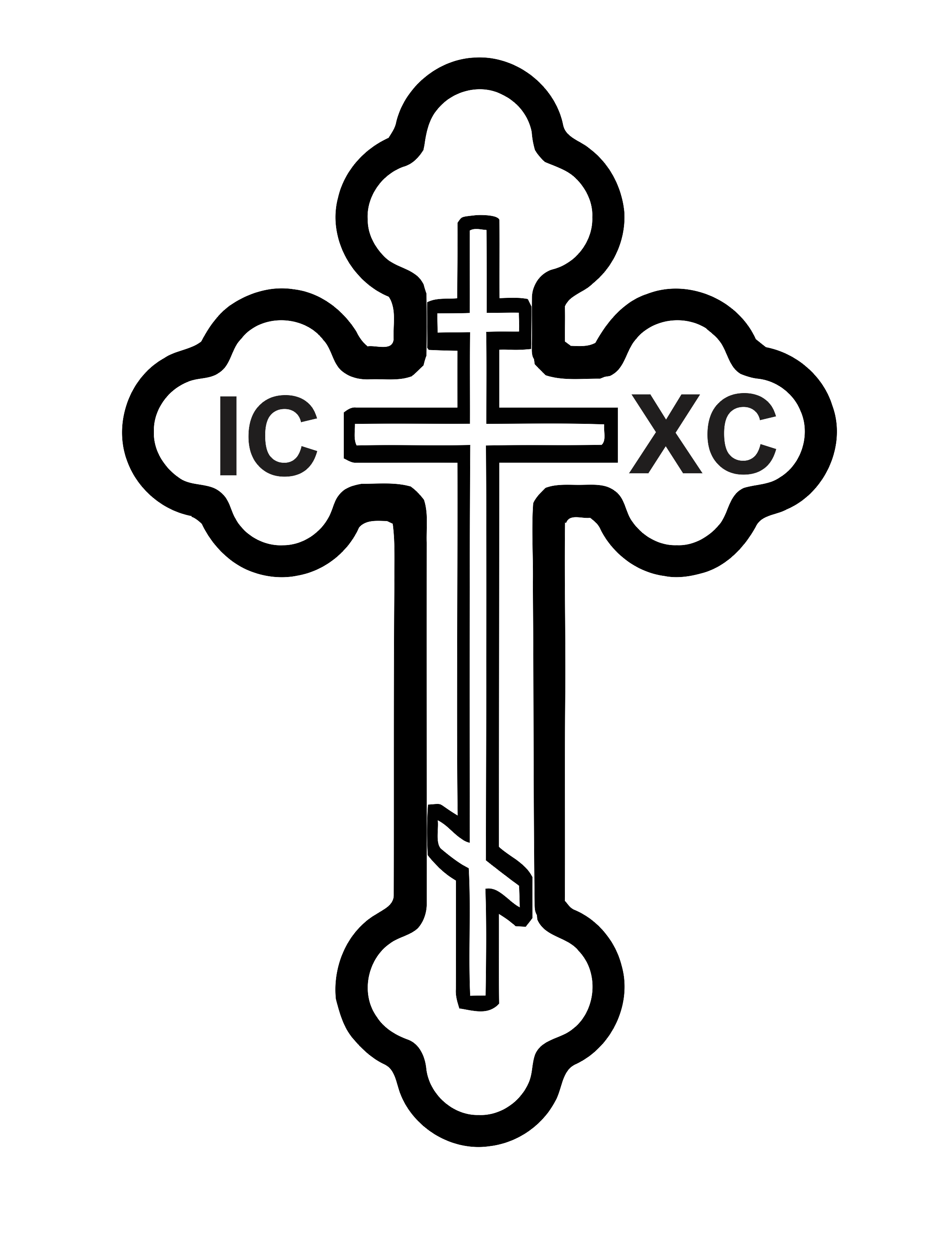 Српски (ћирилица): Србски православни крст